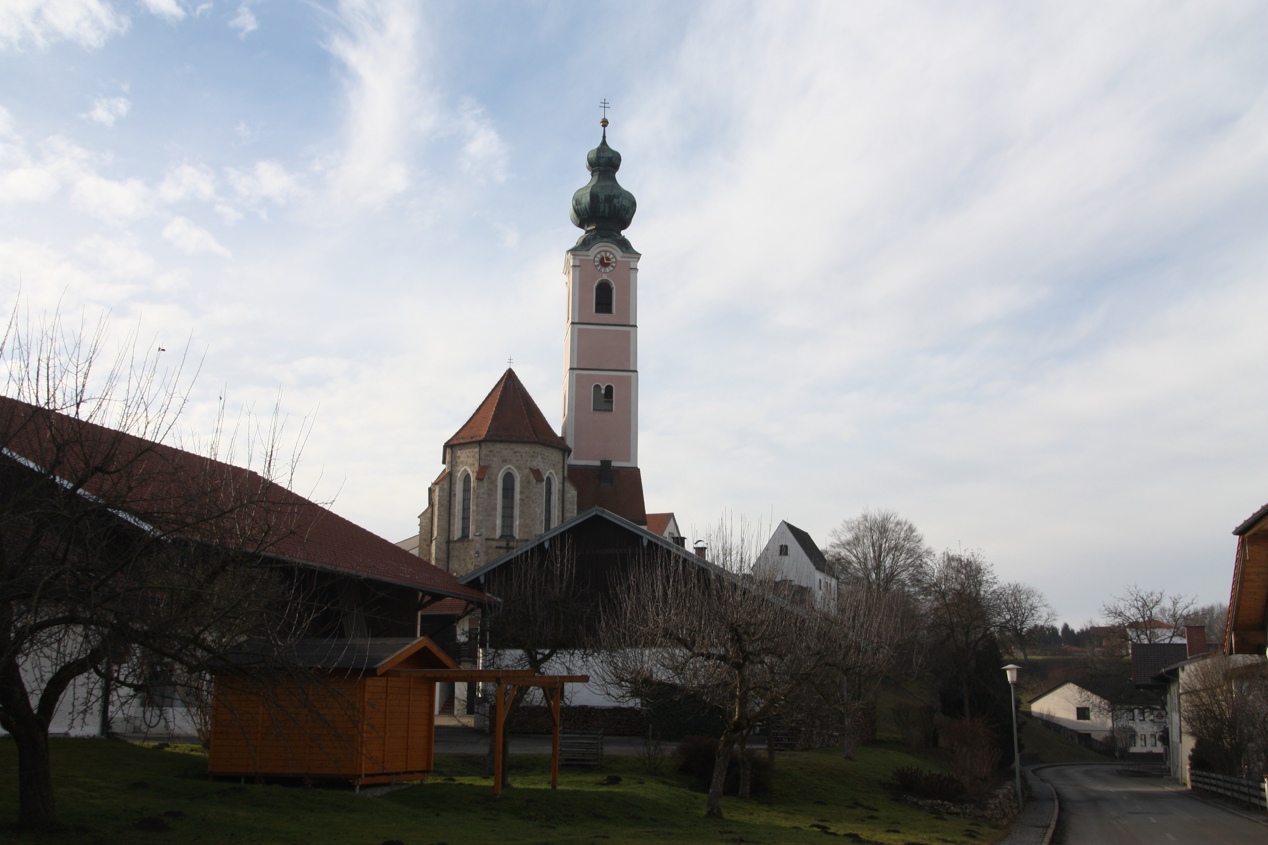 Mehring